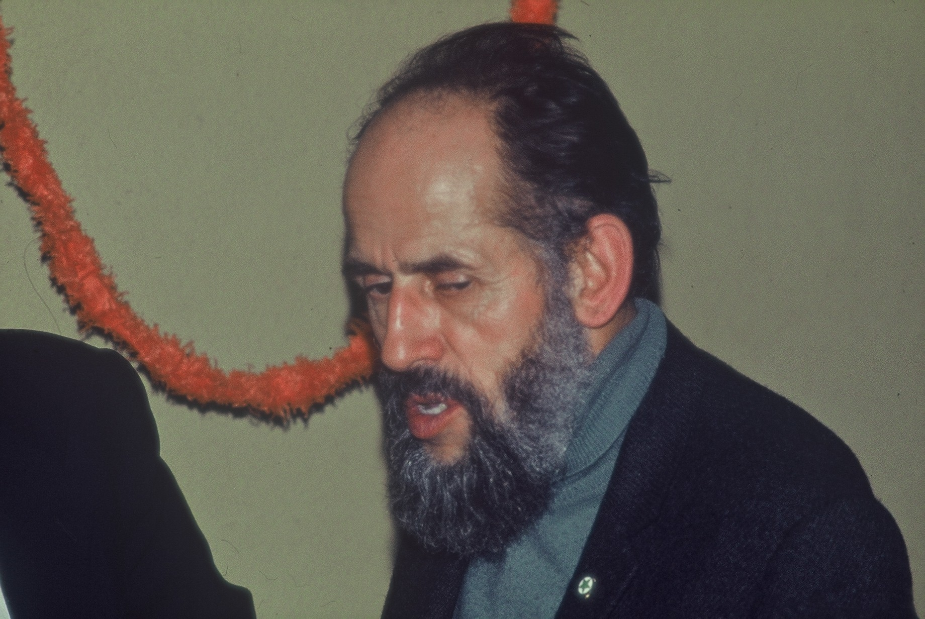 Hendrik (Rik) de Roover en 1972. Propra foto.